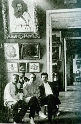 В зале Симбирского художественного музея. Директор Симбирского художественного музея А.Н.Остроградский (справа), П.Е.Корнилов и Д.И.Архангельский в музее. 1923 год. Из книги «Живу и дышу родным городом (по материалам архива Д.И.Архангельского)»